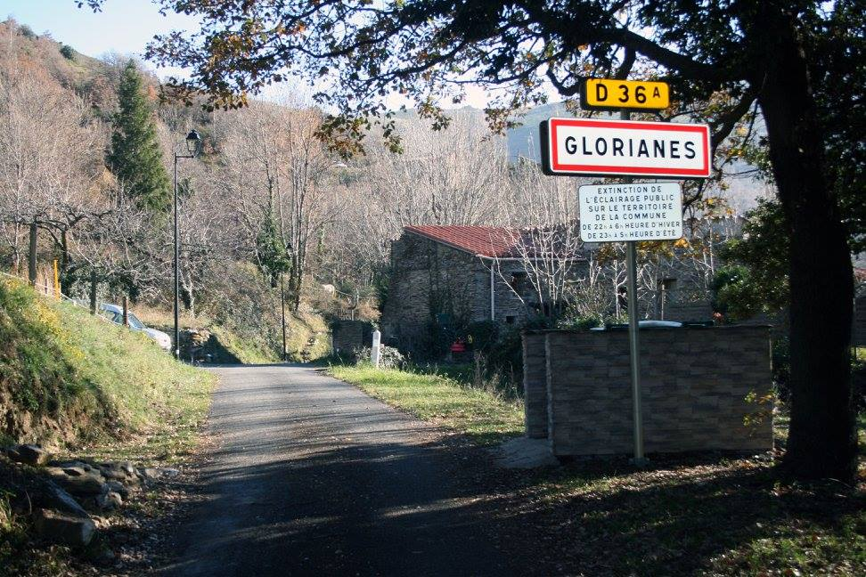 Entrée de Glorianes